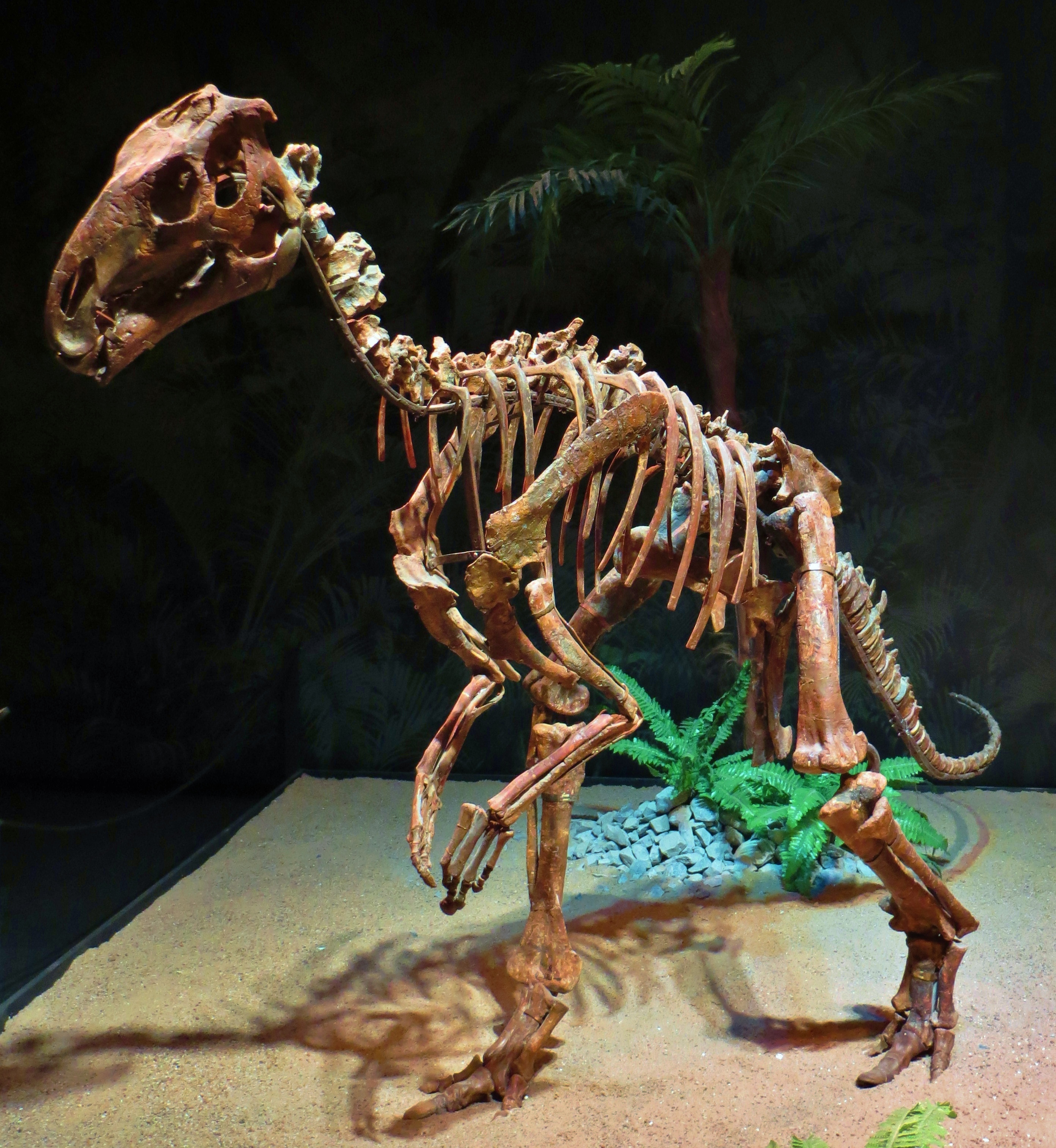 Fossil of Probactrosaurus, an extinct reptile- Took the picture at Dinosaurium, Prague